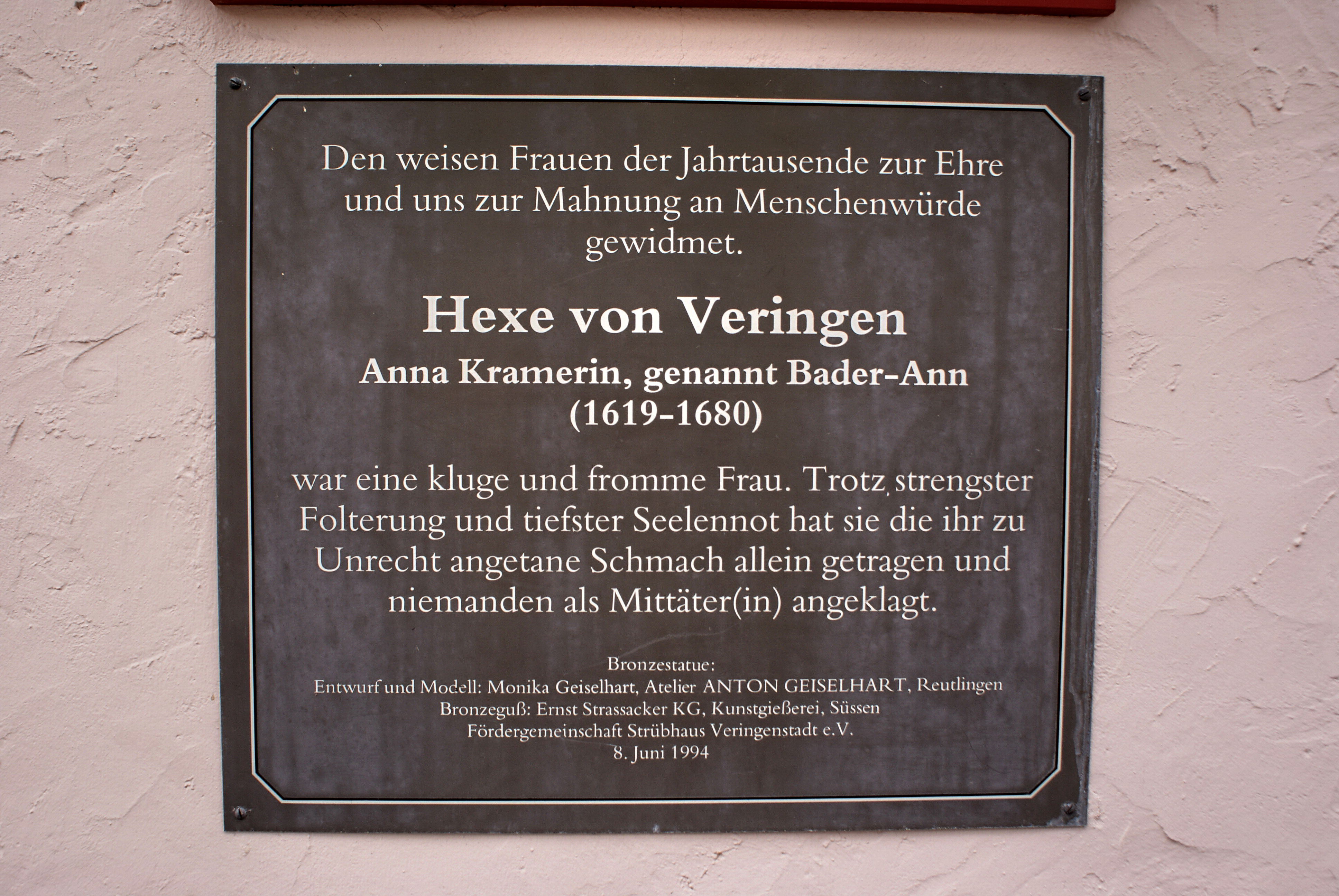 Die Bader-Ann aus Veringenstadt als "Hexe" verurteilt und am 8. Juni 1680 enthauptet und verbrannt.